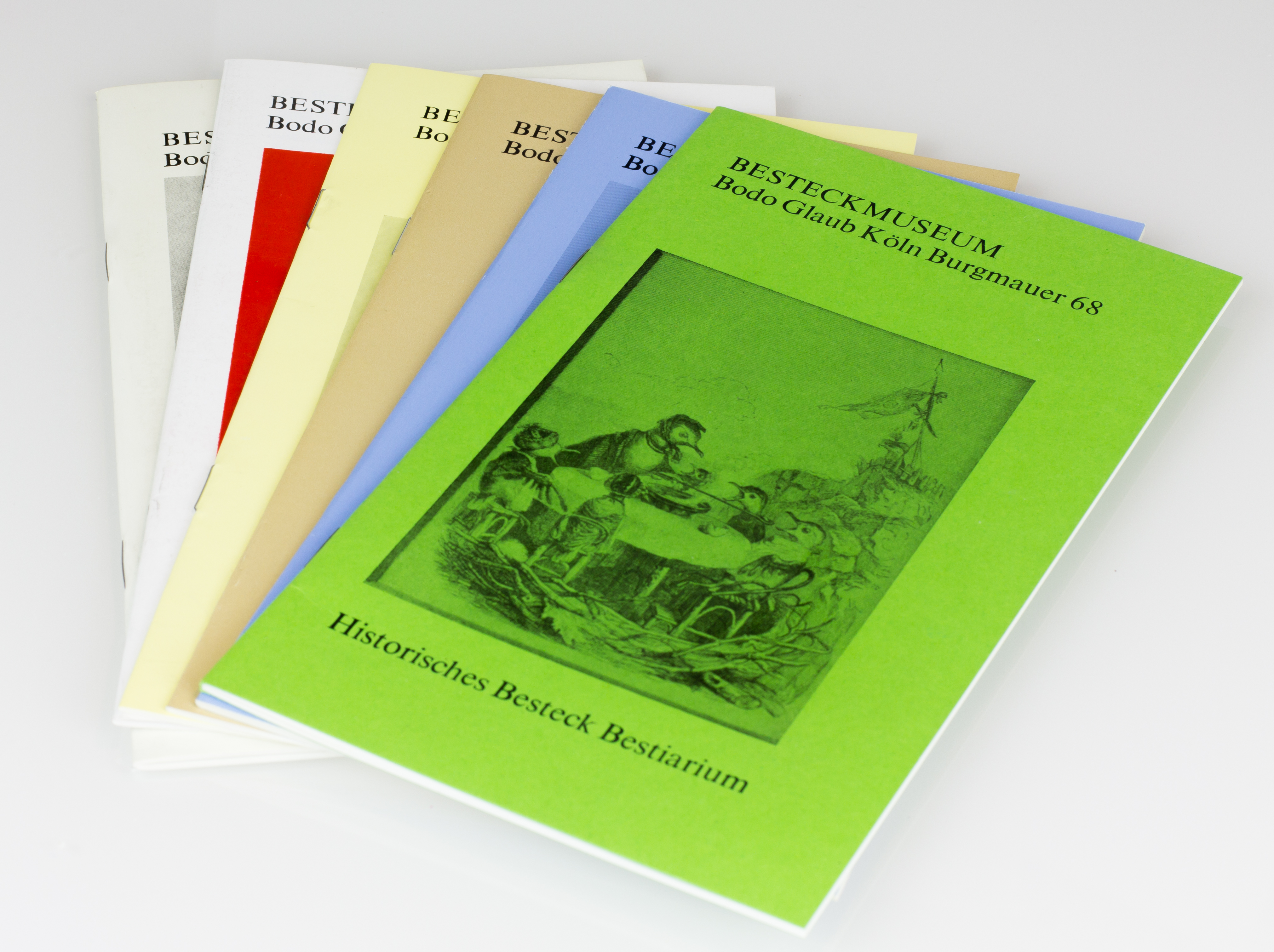 Kurzkataloge des Besteckmuseum Bodo Glaub, Köln (1951-1991)